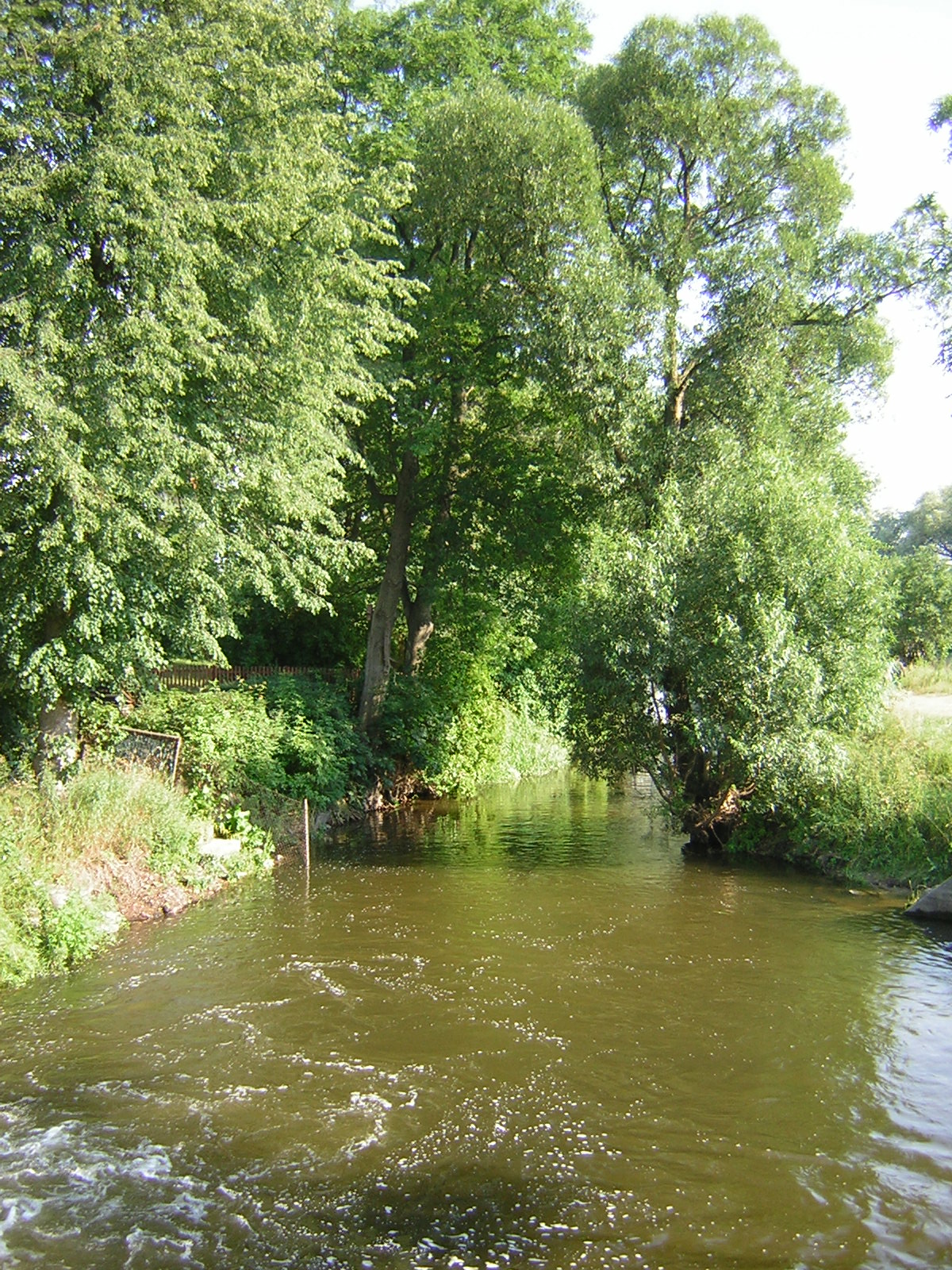 Iławka River in Iława